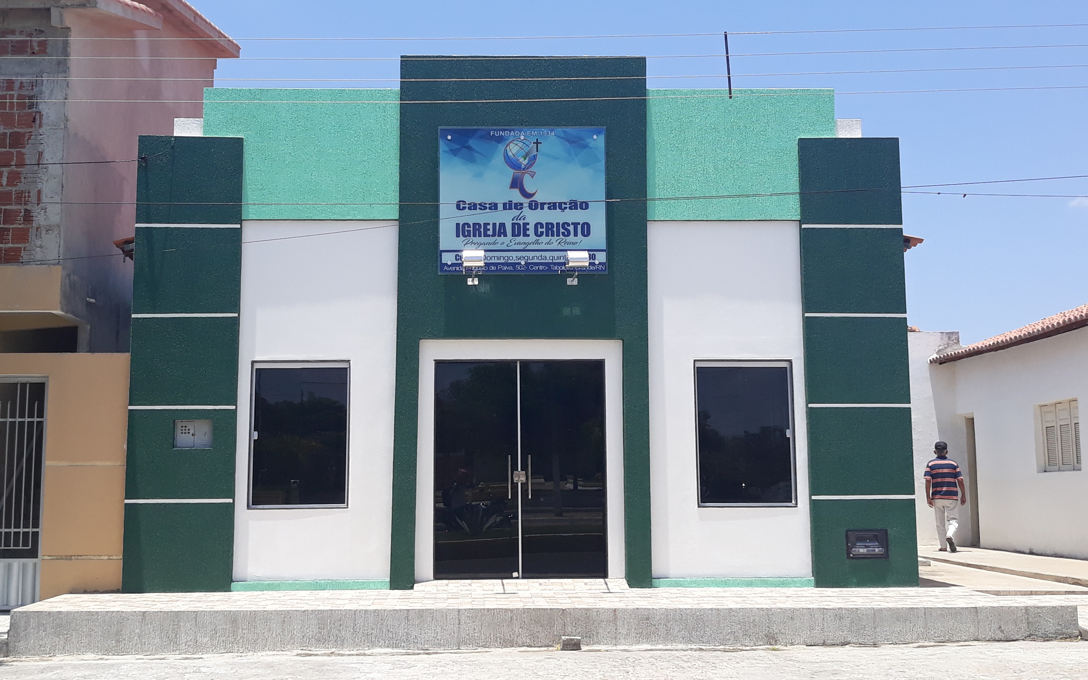 Português do Brasil: Casa de Oração da Igreja de Cristo em Taboleiro Grande, Rio Grande do Norte (Brasil)